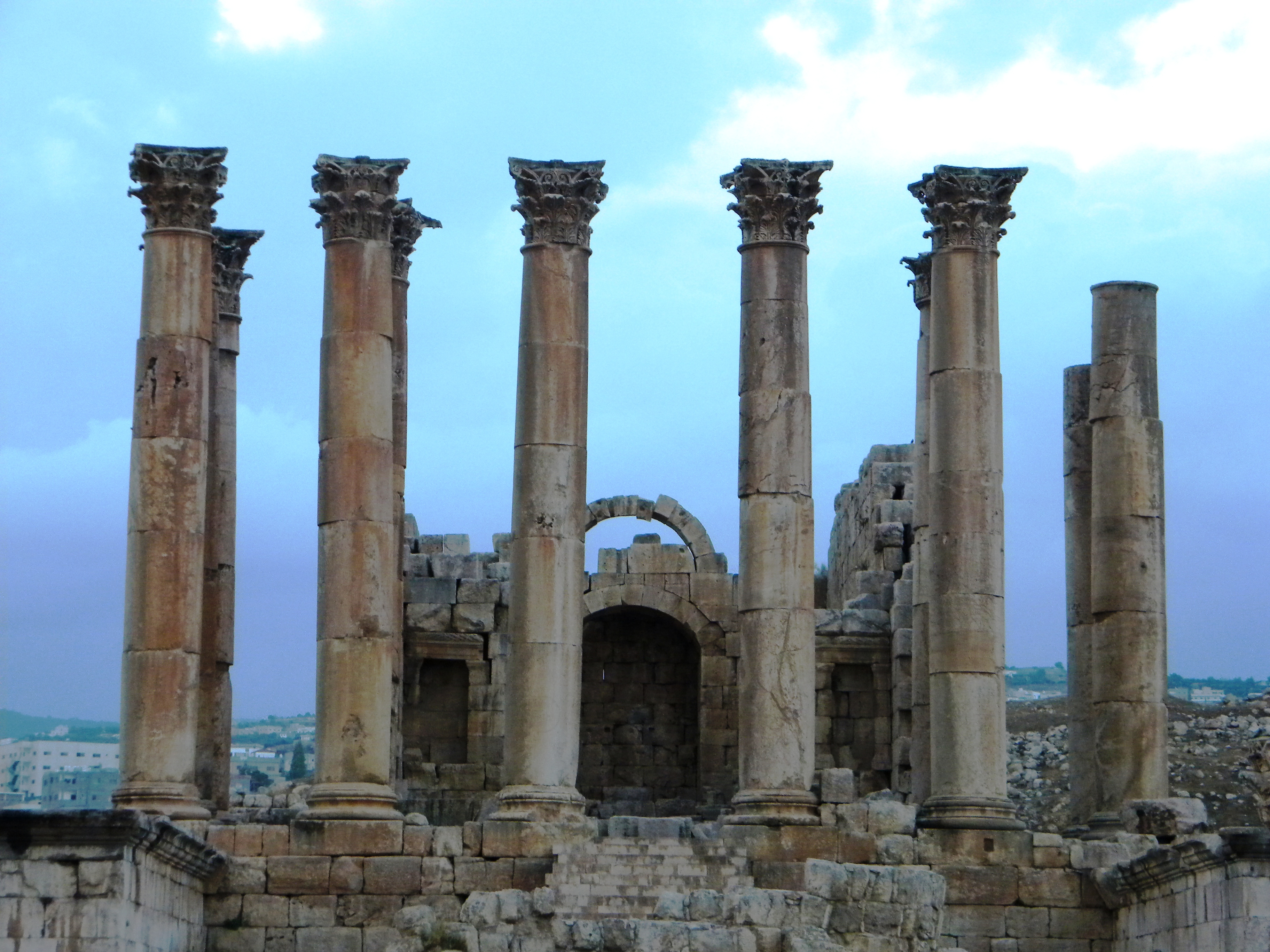 تبين الصورة معبد أرتميس الذي يعتبر معبد الالهة الحارسة للمدينة الذي اقيم في القرن الثاني للميلاد، وهو من أفخر معالم جرش التاريخية في الأردن Jordan, Jerash Temple of Artemis. The sanctuary was sacred to the city's patron deity, and it was the most important place of worship in Jerash (Gerasa). This is reflected in its enormous proportions and in the complexity of its architectural features. It was built during the 2nd century AD.